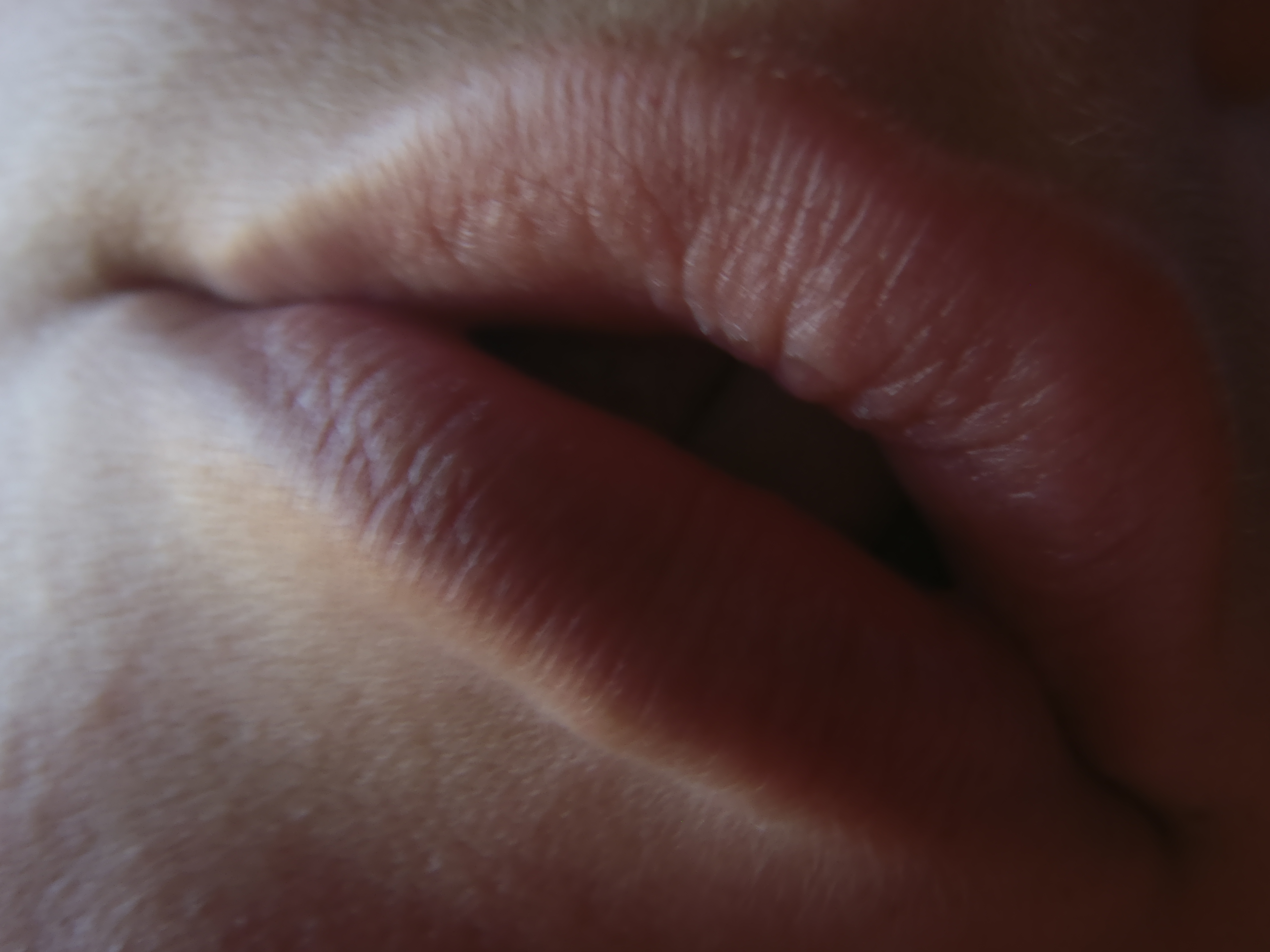 une bouche